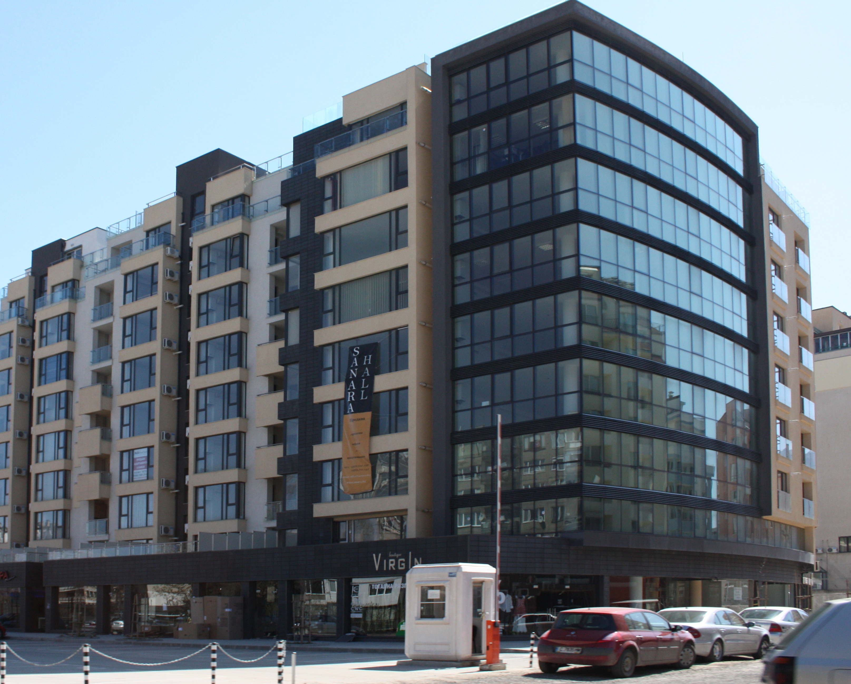 Borovo, Sofia, Bulgaria